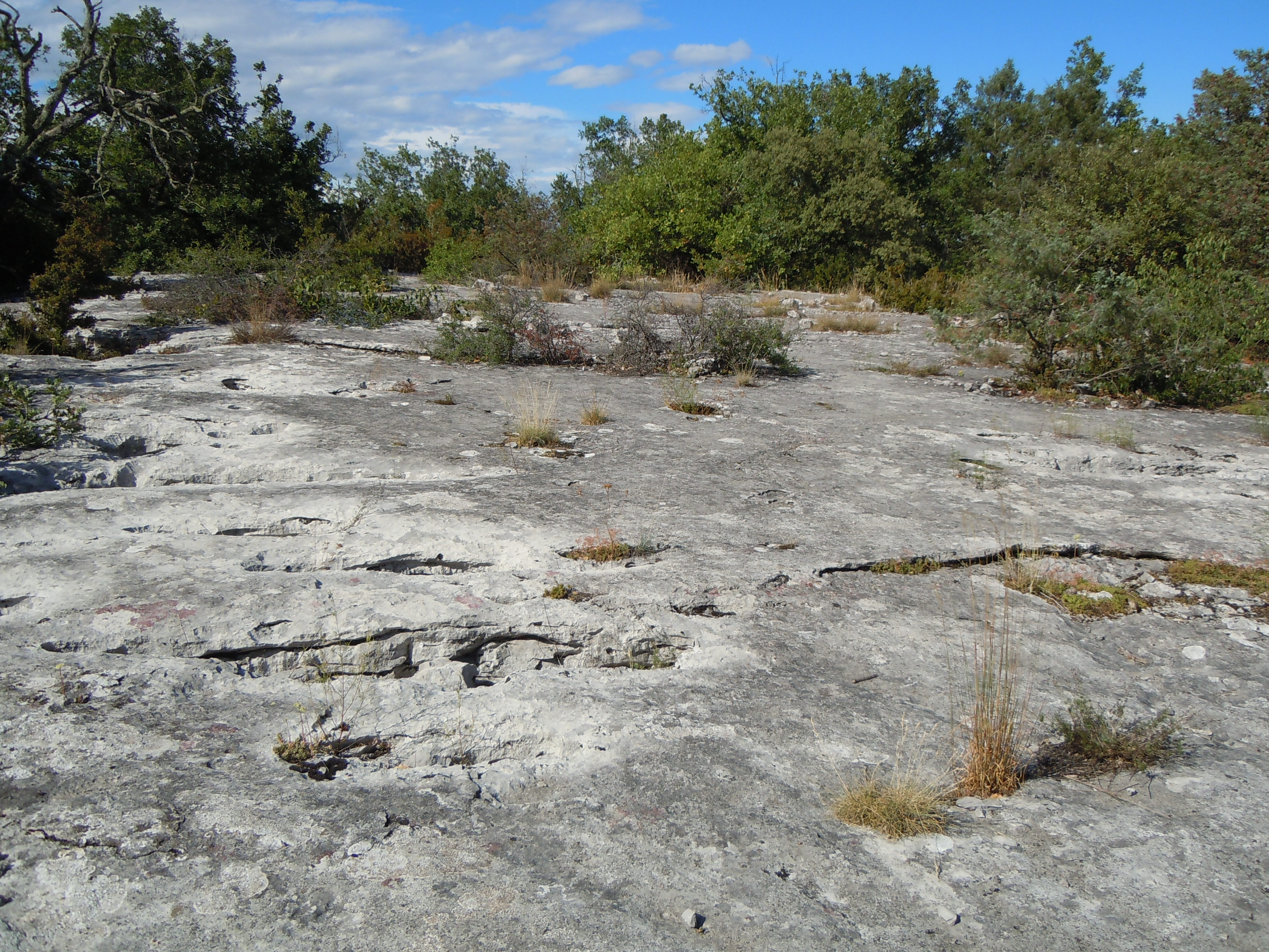 Bois de Paiolive - lauze calcaire - affleurement calcaire - Ardèche - France